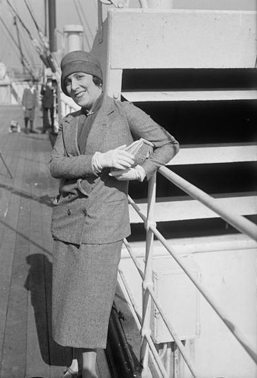 Lucrezia Bori (1887 – 1960), Spanish operatic singer, soprano